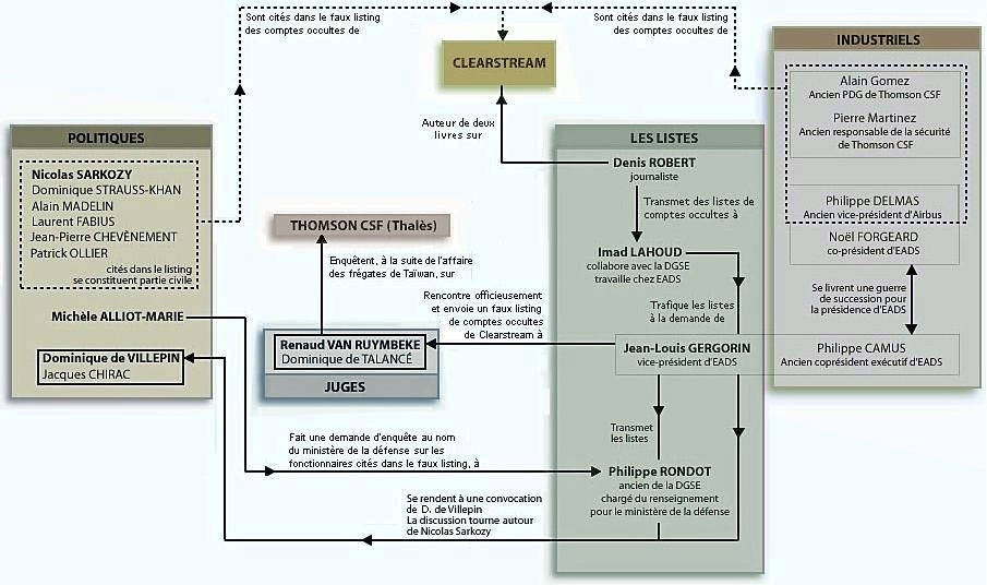 Schéma de l'affaire Clearstream 2, réalisé par inspiration et adaptation (d'après les nouvelles données de l'enquête) d'un organigramme publié dans Le Monde en juin 2006.